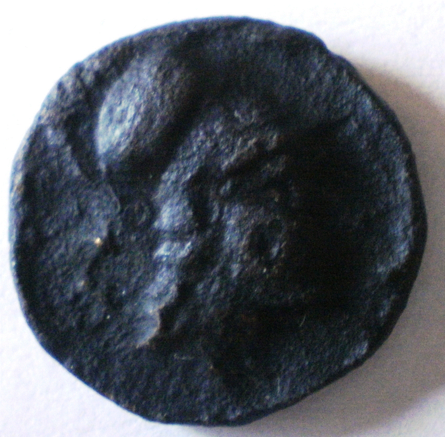 монета тетрахалк Тирской чеканки голова Афины вправо